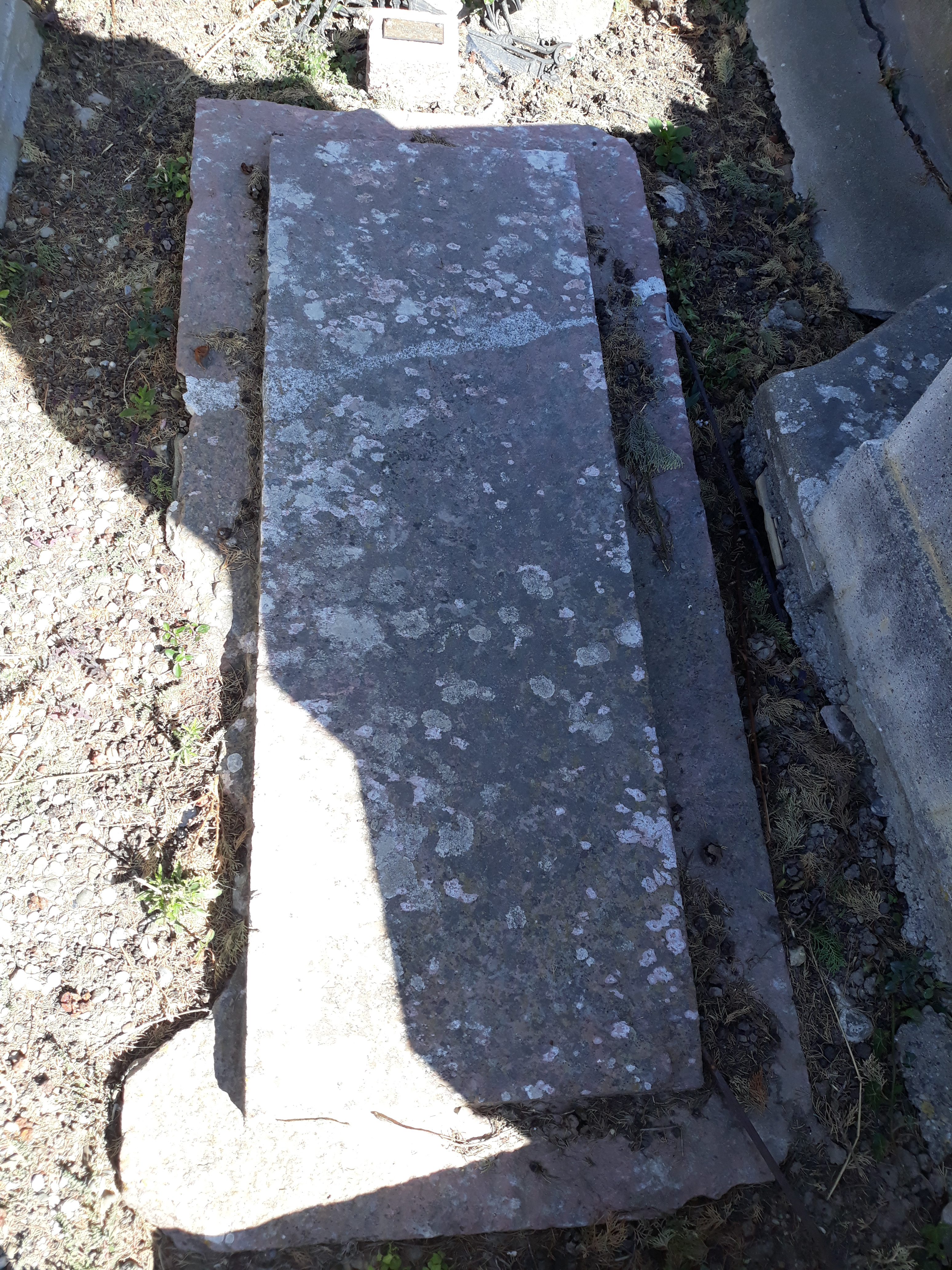 Das Grab des französischen Verfassungsbischofs Guillaume Besaucèle auf dem alten Friedhof von Carcassonne (Aude).